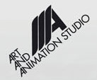 Kozí příběh plakát